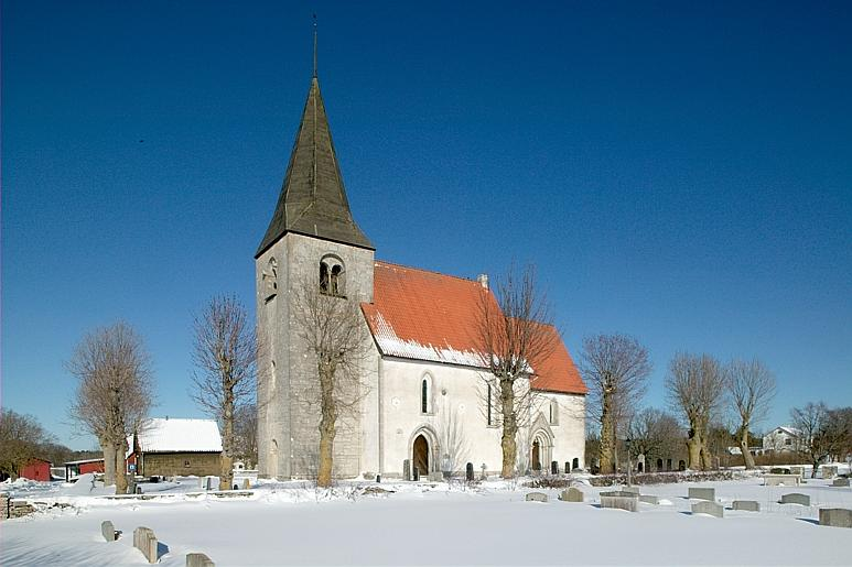 Kyrkan från sydväst. Motiv: Hejnums kyrka Kategori: (01) ExteriörerKyrkan från sydväst.